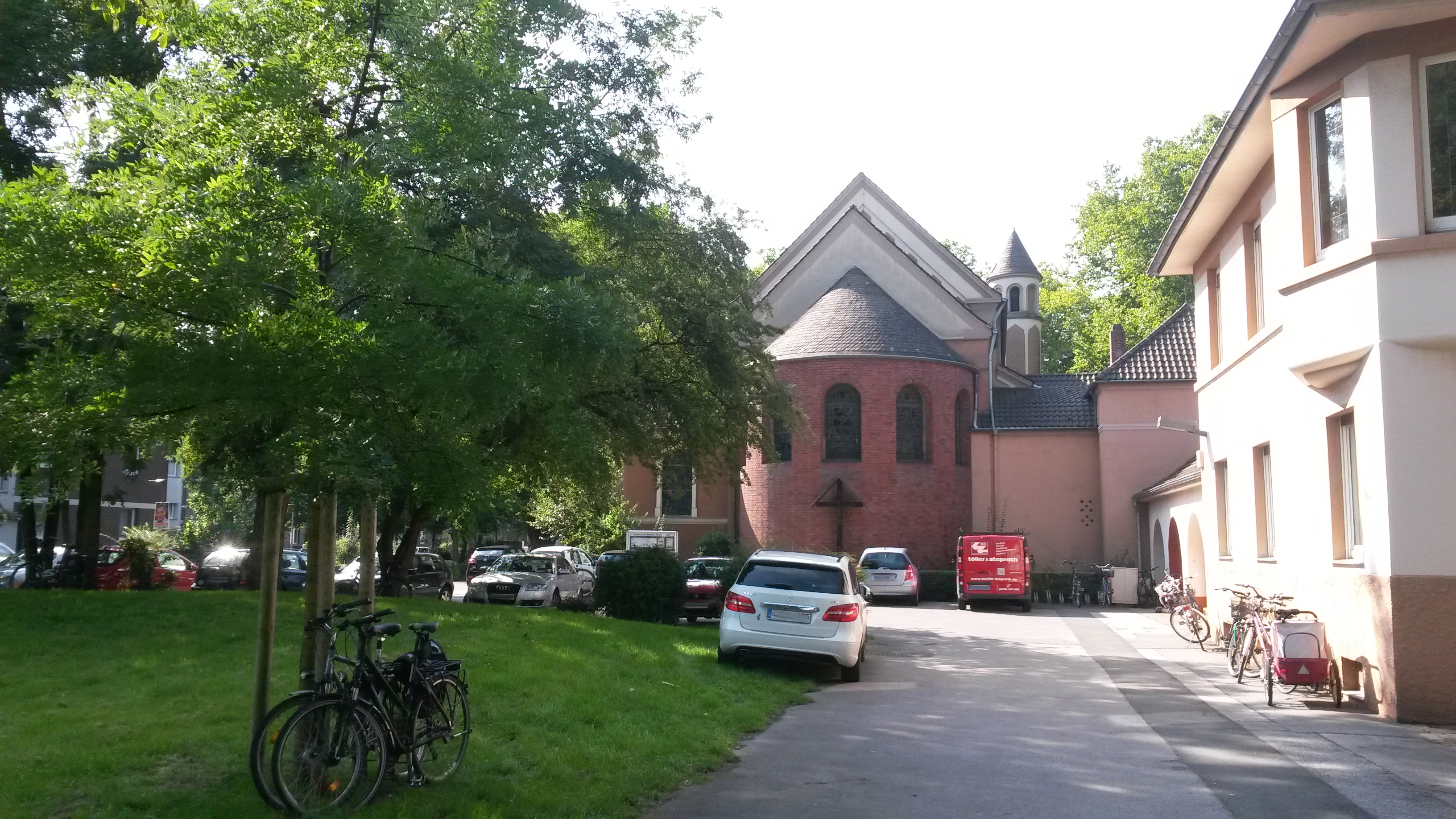 Der Peterplatz mit Pfarrhaus und Peterskirche in Alstaden (Oberhausen)